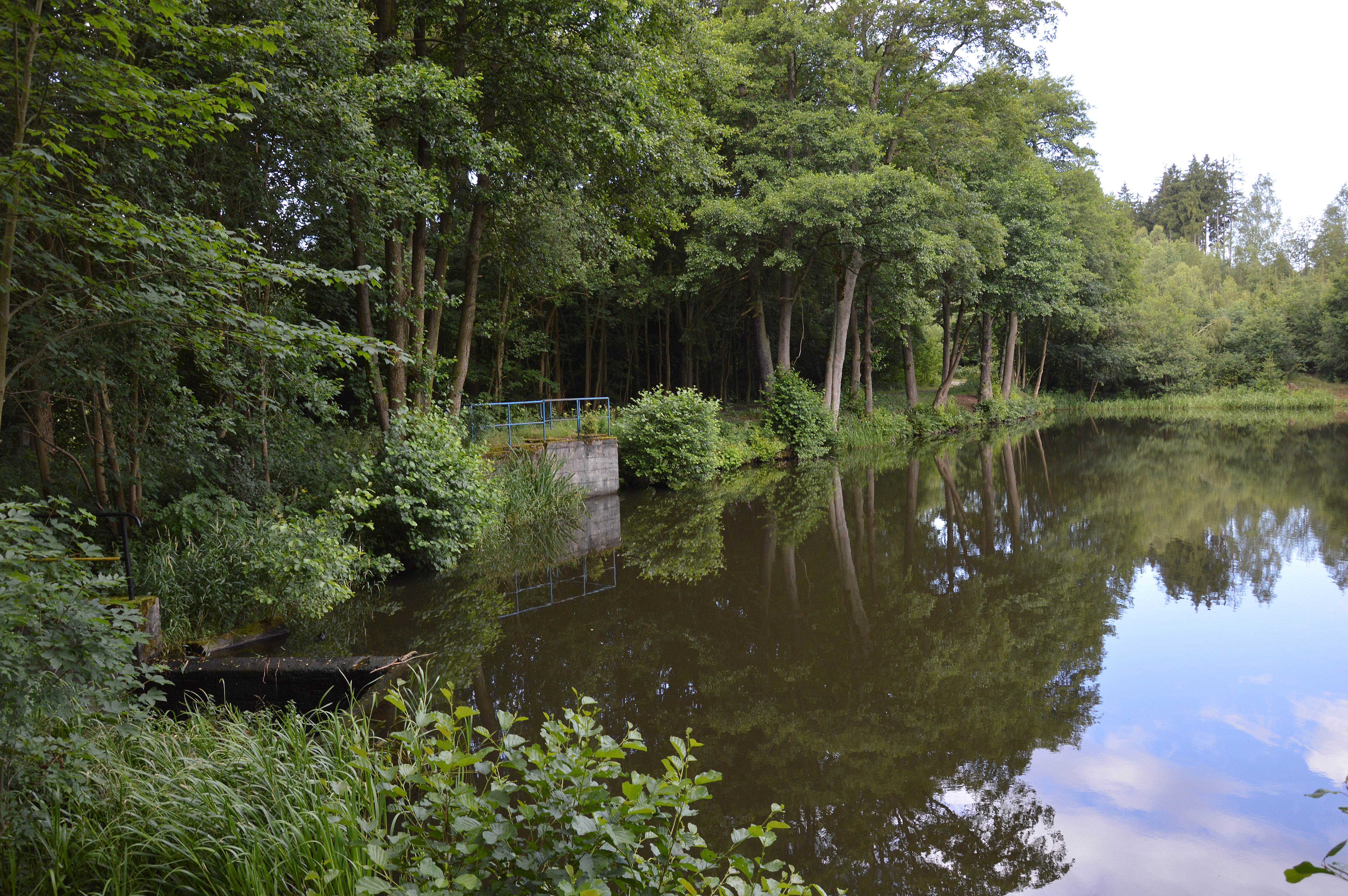 Elbingstalteich 2017 Südufer